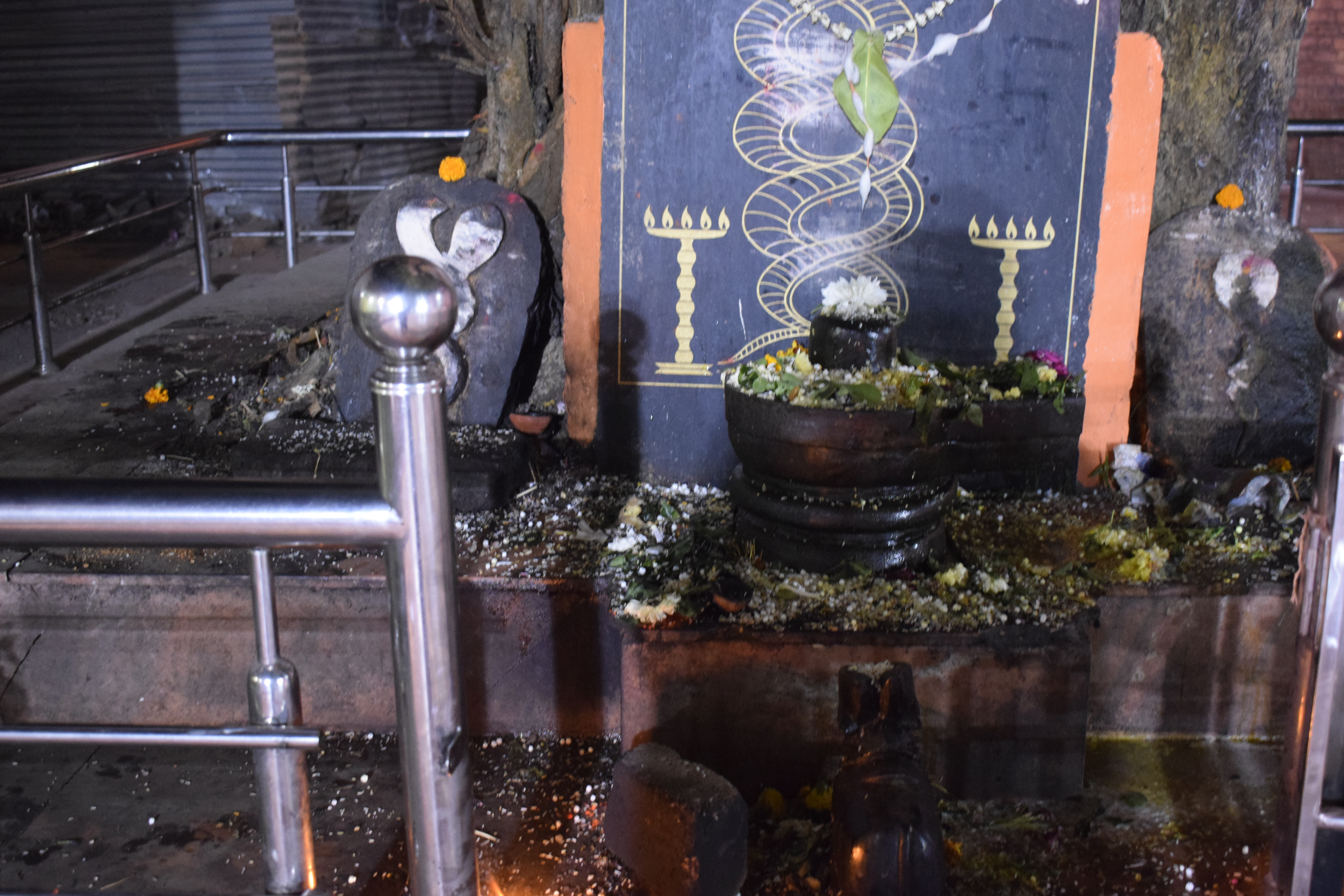 श्री जबरेश्वर लिंग